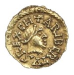 Caribert II tête diadémée à droite. Monnaie mérovingienne, tiers de sou d'or (trémissis) frappé à Banassac. Bibliothèque Nationale de France.